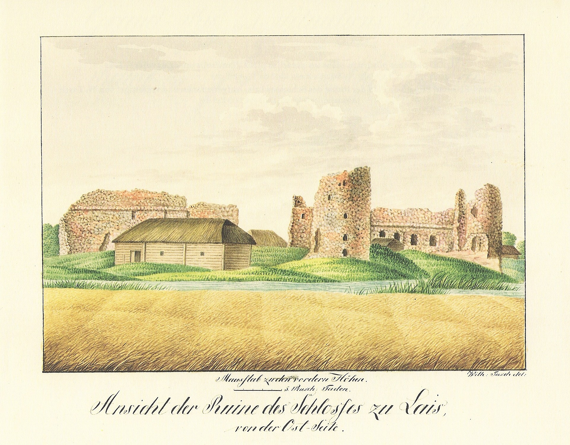 Laiuse linnuse varemed